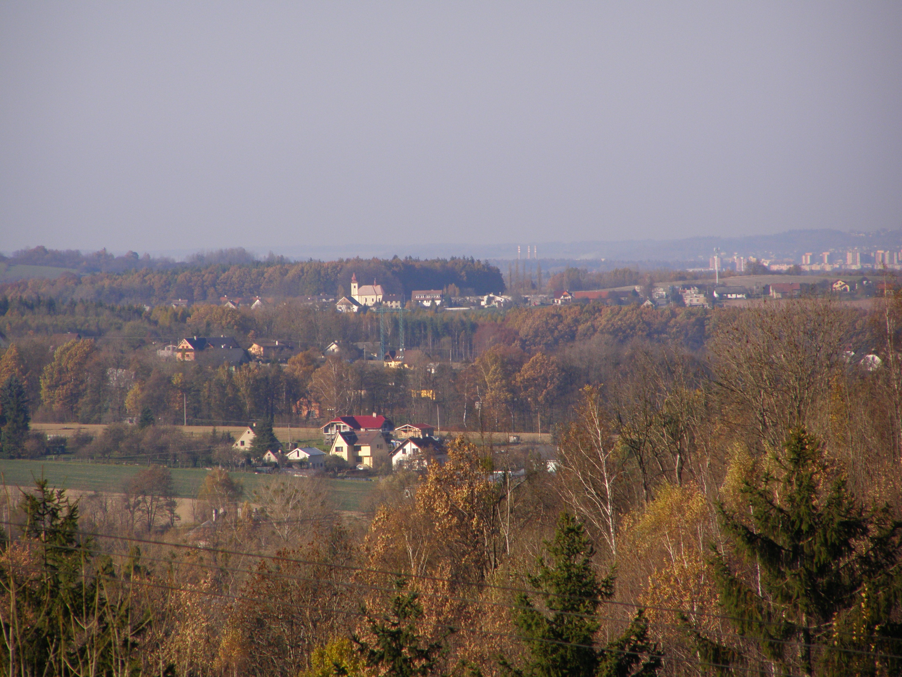 Česky: Metylovická pahorkatina, pohled ze severního úbočí vrcholu Na kopci (412 m) na severozápad: Palkovické podhůří, uprostřed obrázku kostel kostel Panny Marie Sněžné v Lysůvkách (část města Frýdek-Místek)